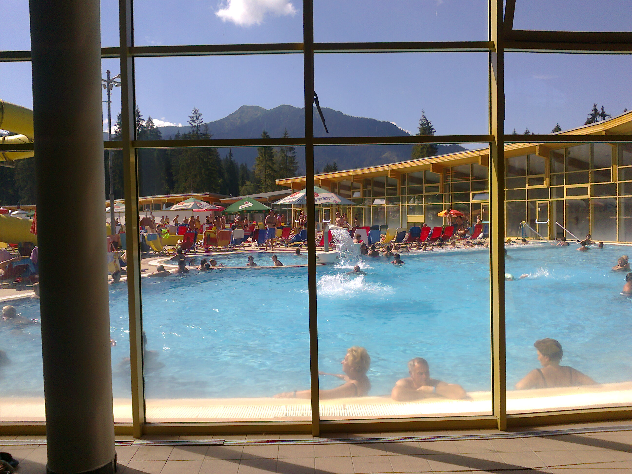 Oravice